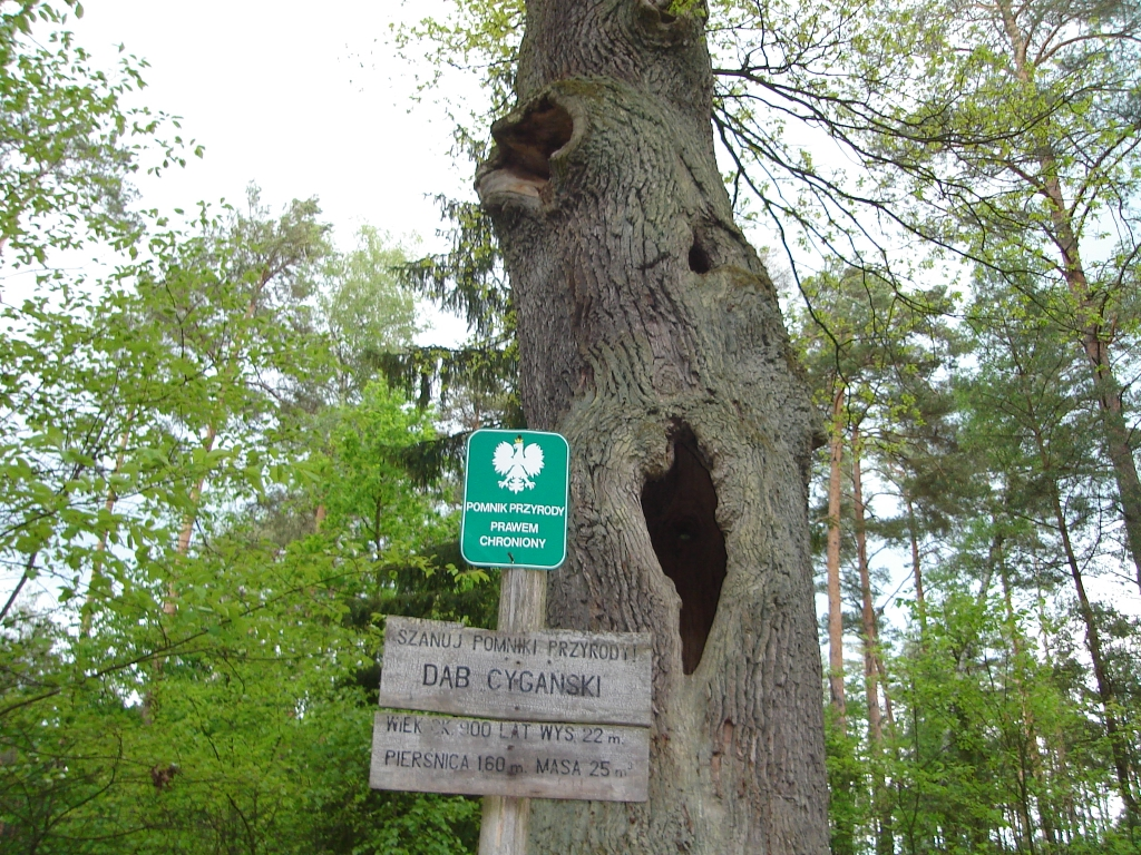 Dąb cygański